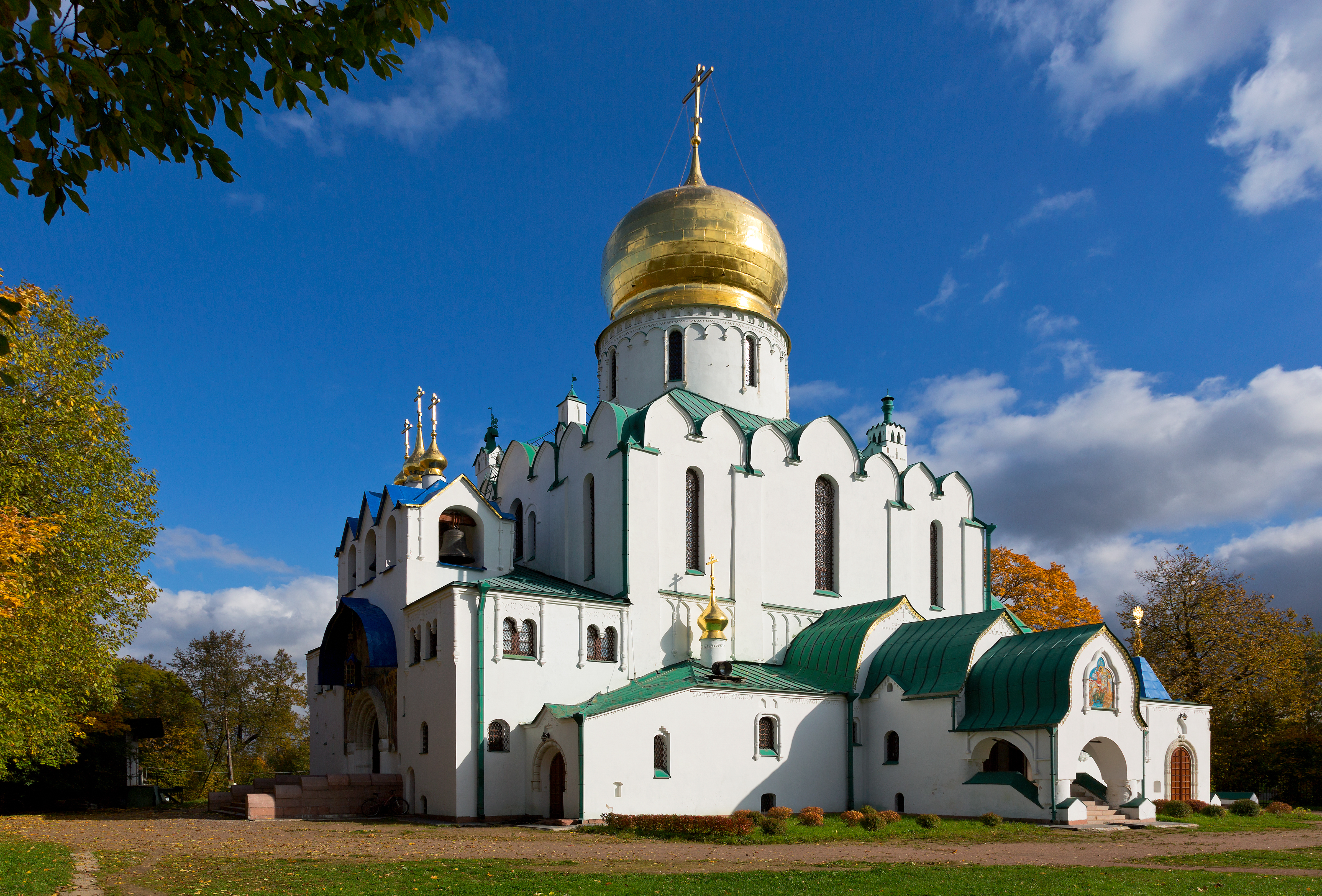 Собор Федоровский (Санкт-Петербург и Лен.область, Пушкин, Академический проспект, 32, северо-восточная часть парка)